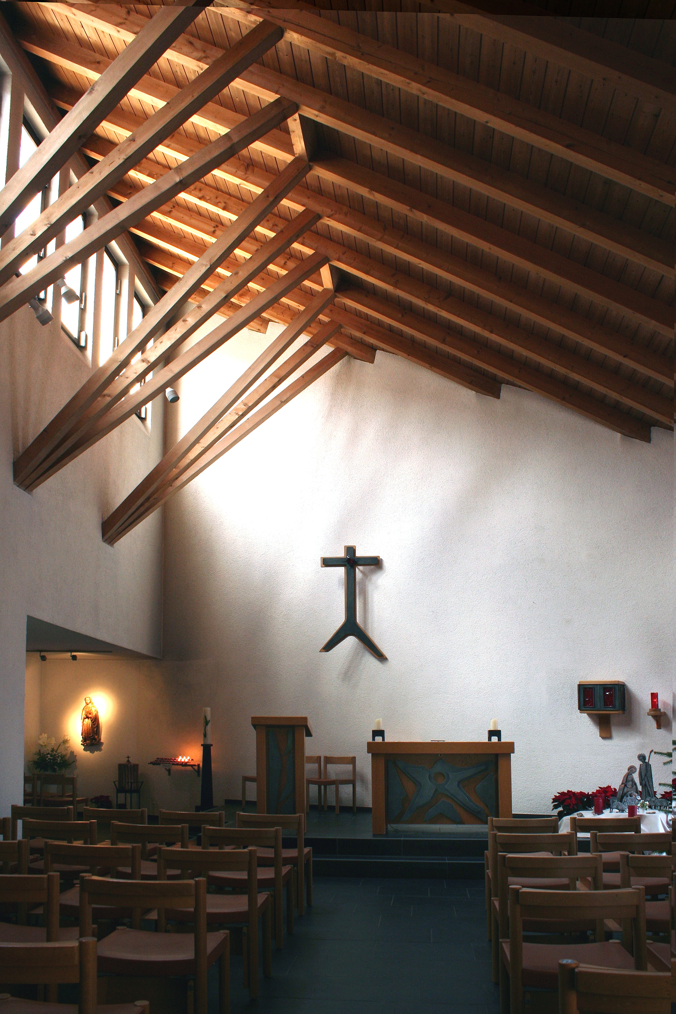 Römisch-katholische Kirche Bruder Klaus Zumikon, Blick zum Altarraum